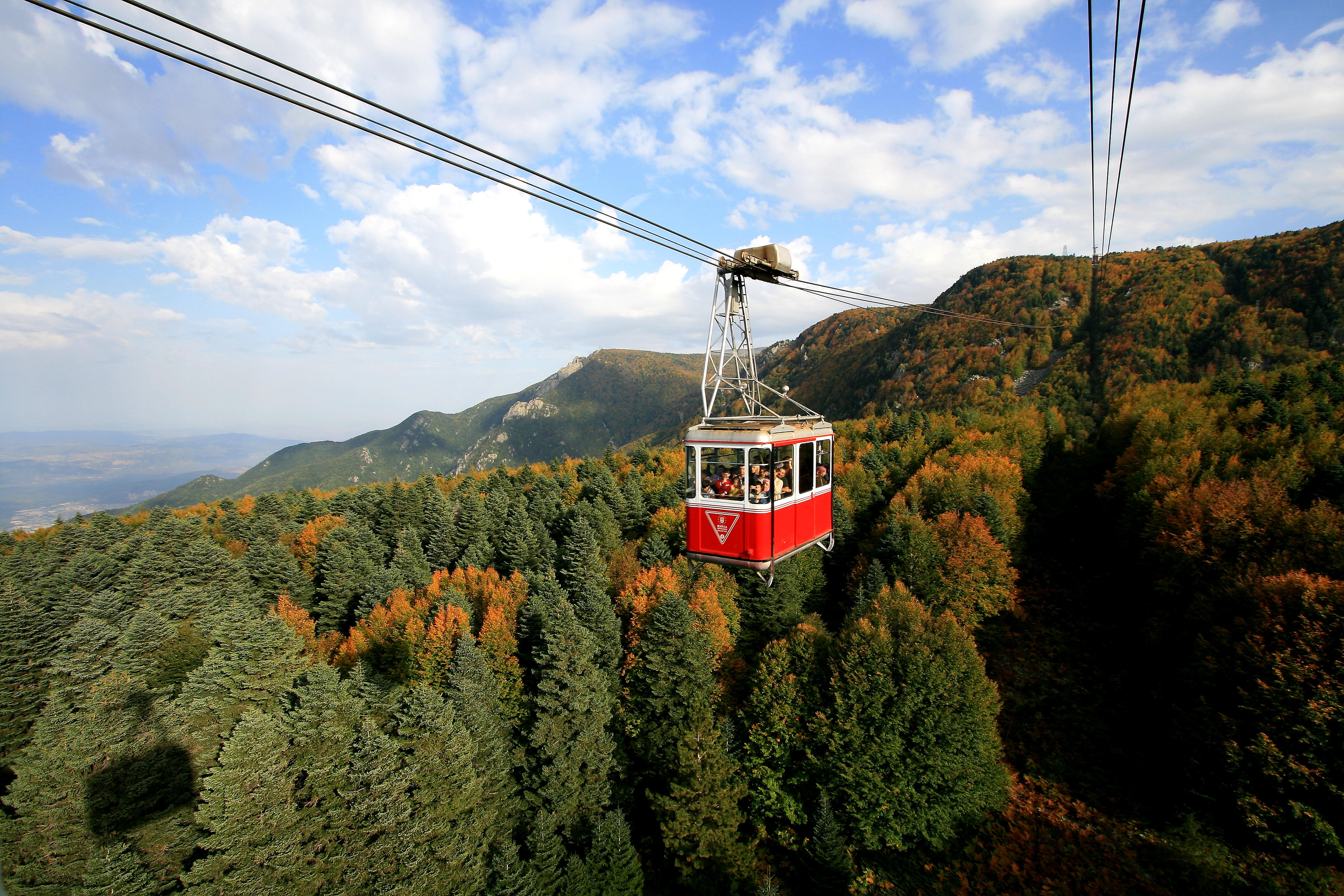 Teleferik ile Uludağ